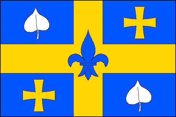 Vlajka obce Knínice u Boskovic